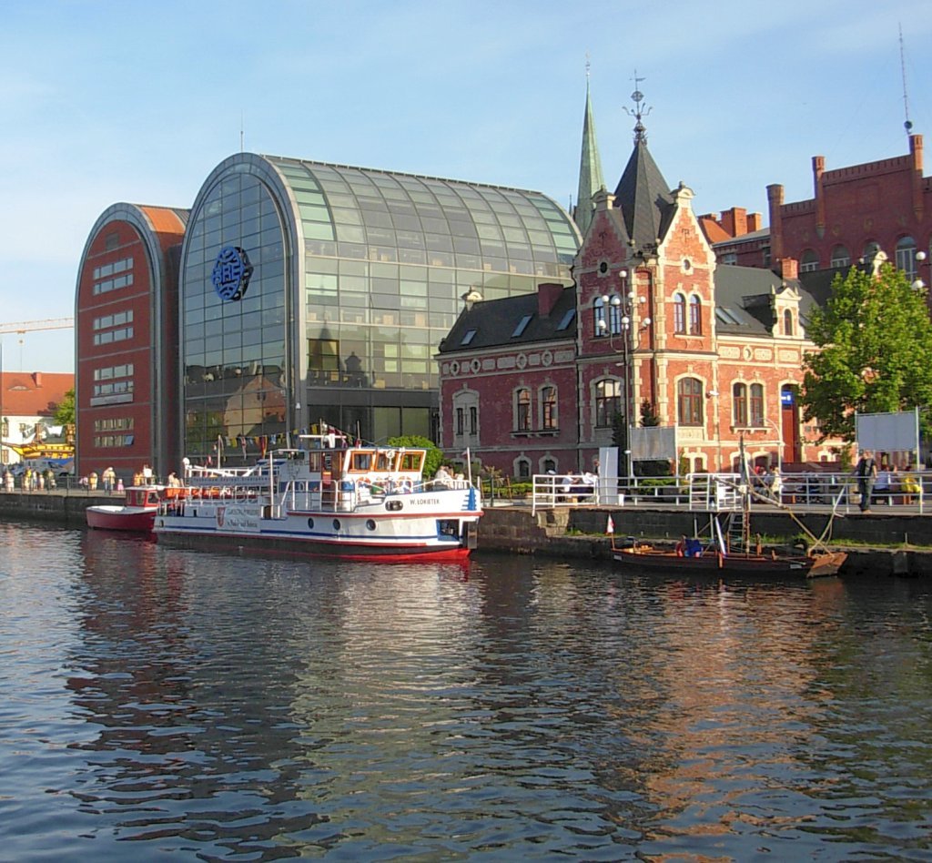 Obiekty BRE Banku i Pałacyk Lloyda w Bydgoszczy